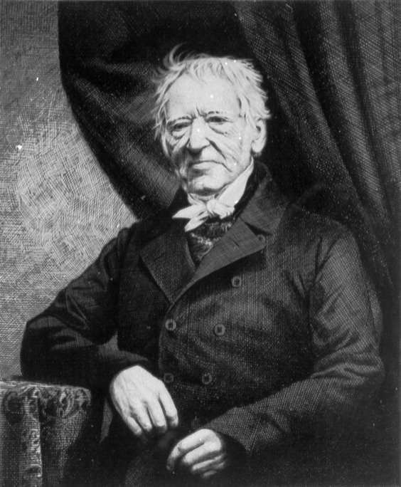 Karl Reinhard Müller, Zeichnung von Ferdinand Justi nach einer Fotografie 15.6 × 13 cm (6.1 × 5.1 in)